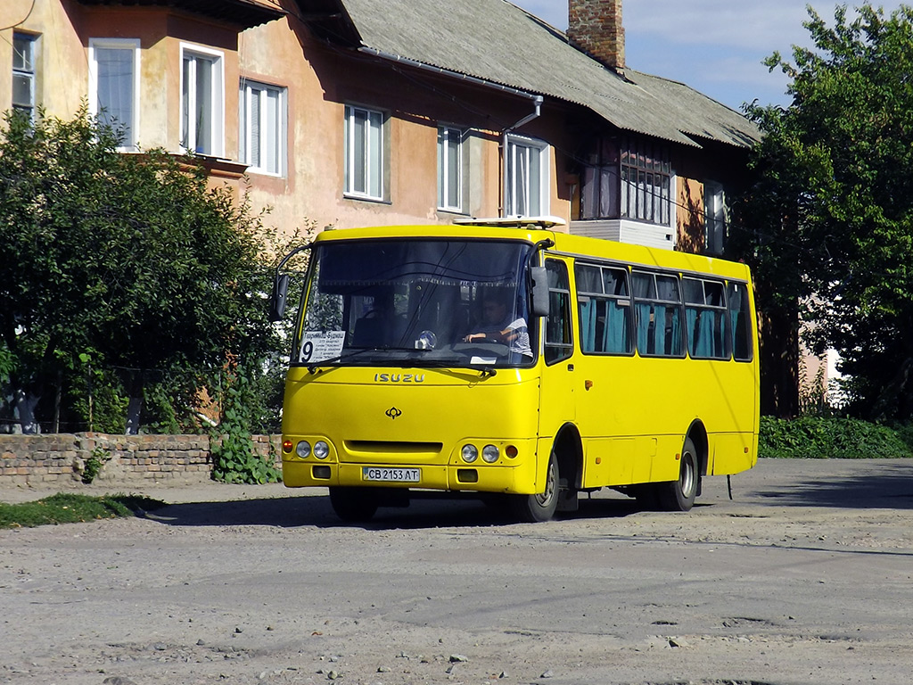 ул. 18-го Сентября, автобус 9 маршрута на конечной "пос. Строймаш"